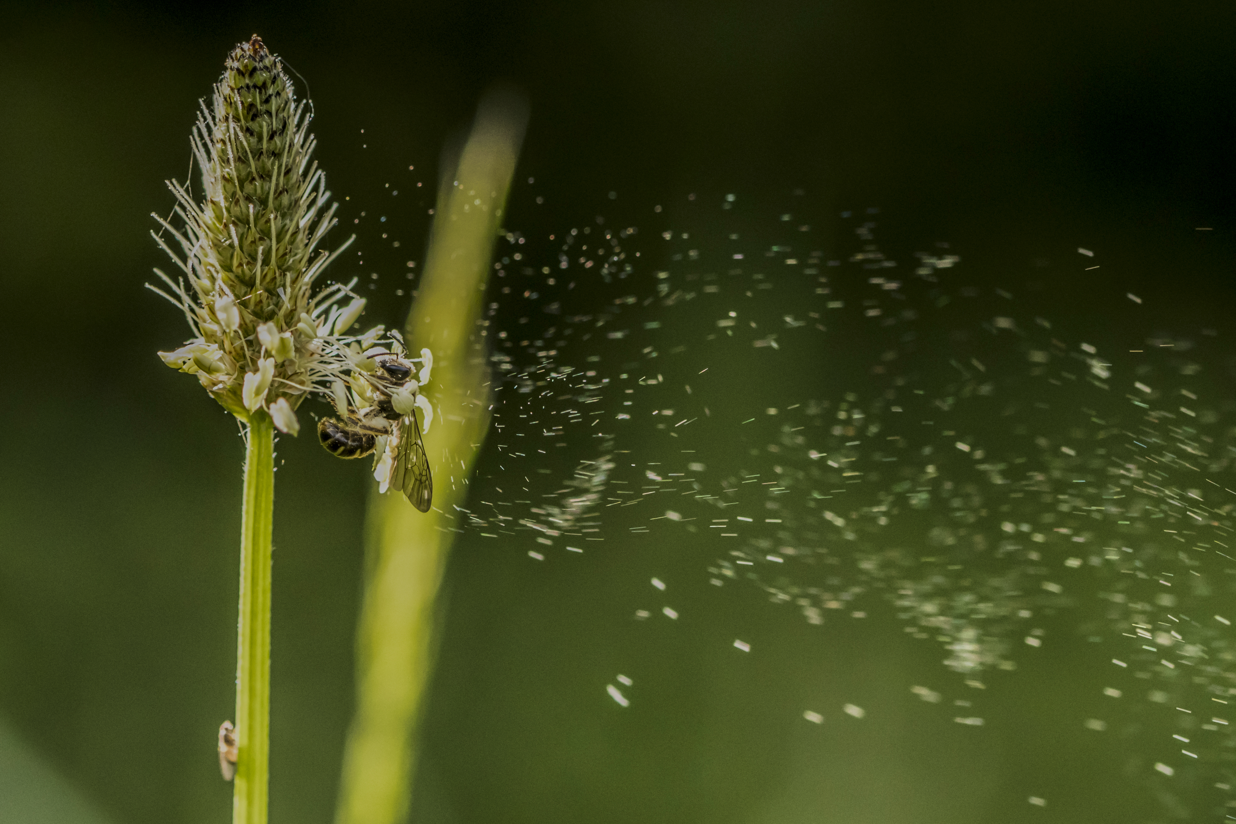 Monti della Valcuvia (Q49959523)